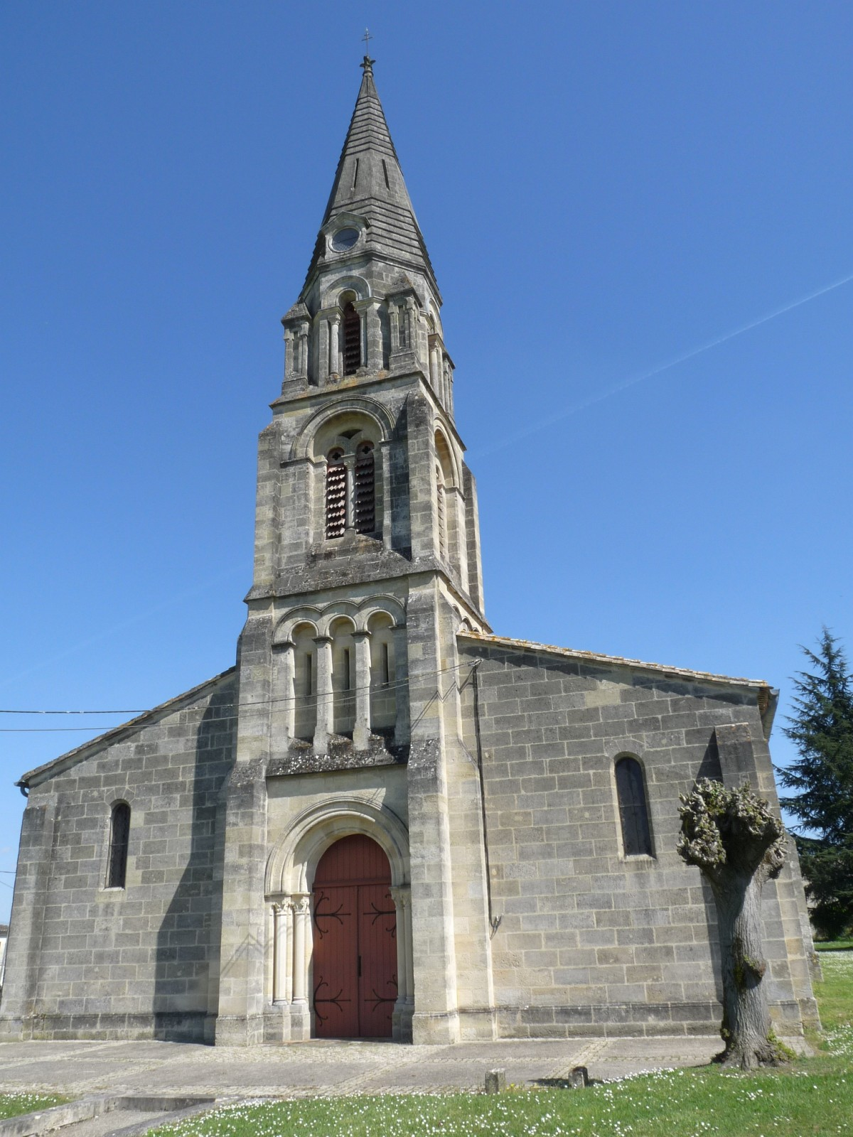 Eglise des Peintures, Gironde, France